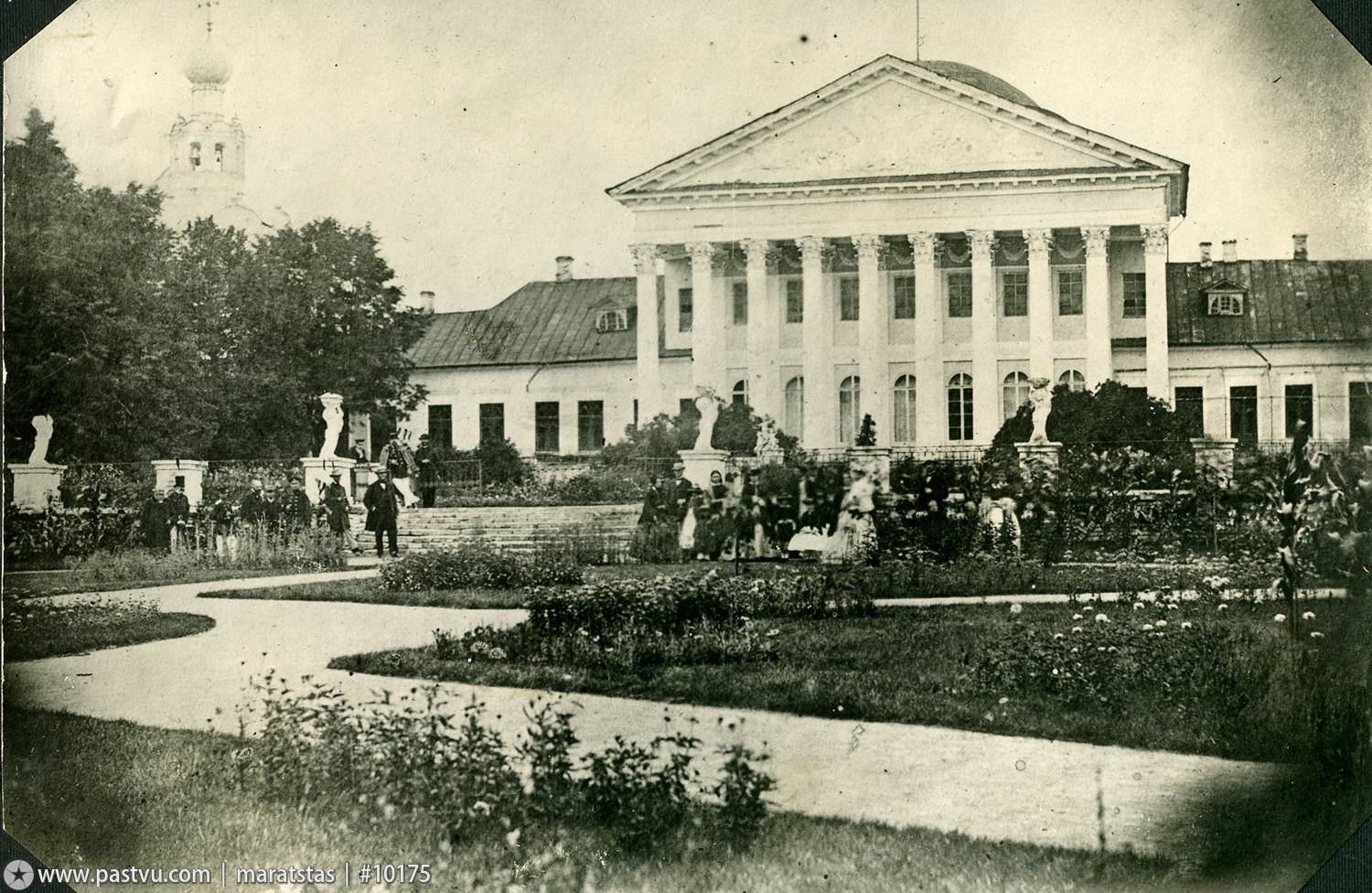 Дворец усадьбы Петровско-Разумовское, снесённый в 1863 году. На фото владелец усадьбы барон Павел фон-Шульц (в котелке) и его друзья и родственники. Фото сделано в парке усадьбы, в левом углу виден купол храма апостолов Петра и Павла.